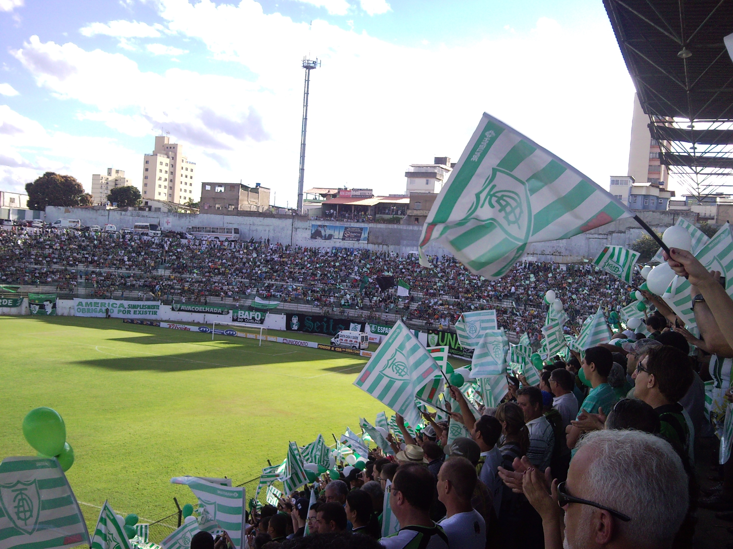 Estadio Raimundo Sampaio durante jogo do América Mineiro.